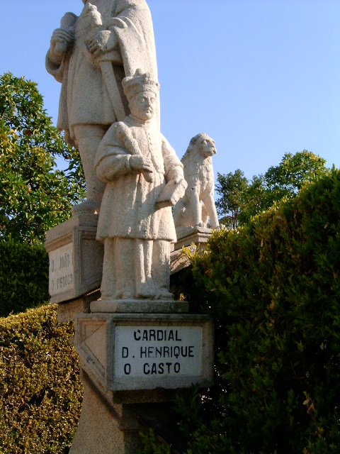 Cardeal D. Henrique, no Jardim Episcopal de Castelo Branco Photo by Manuel Anastácio